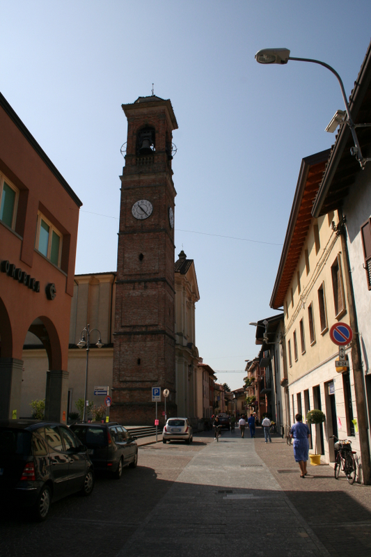 Bariano BG, la torre